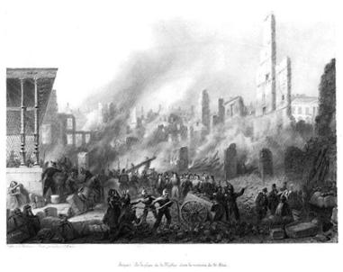 Dessin à la plombagine de J.J. Maquart. La place de la Motte de Limoges (87) lors de l'incendie de 1864